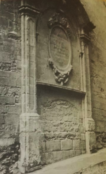 Així es trobava l'antiga font quan encara no estava en funcionament